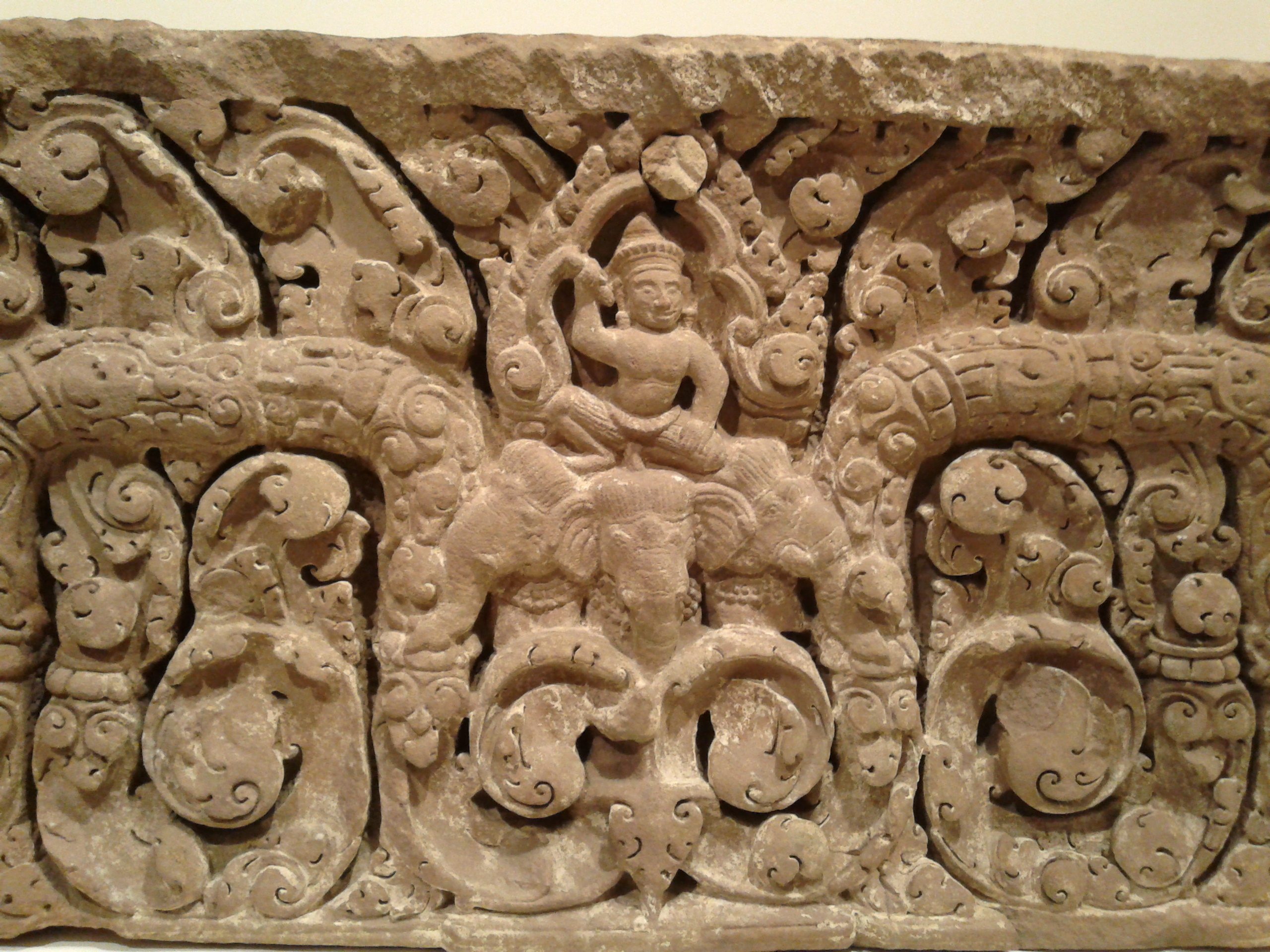 Indra a Hindu god National Gallery of Victoria - Asian art